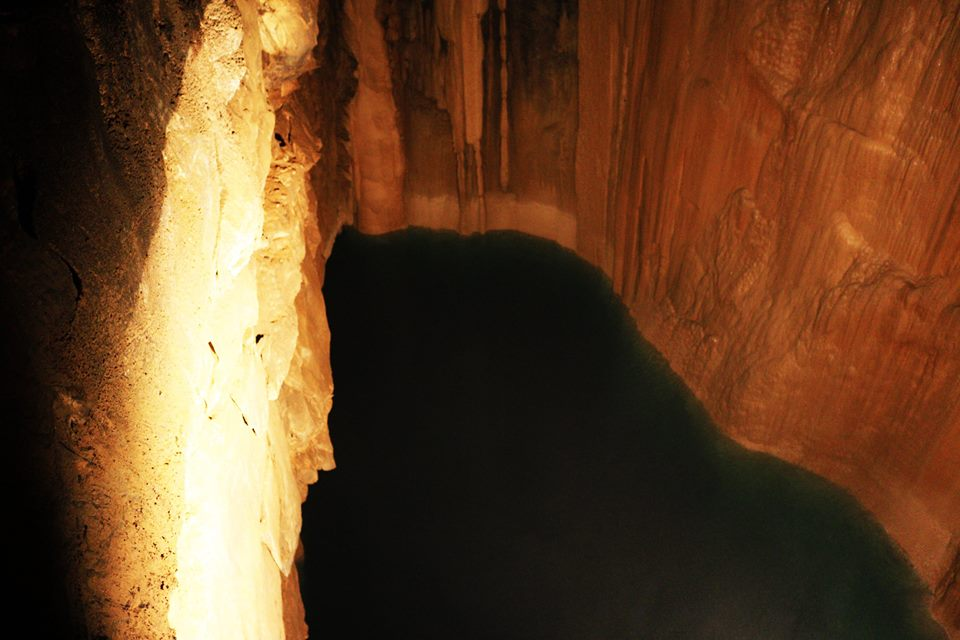 mağaranın içindeki göletin 15 metre derinlikteki görüntüsü